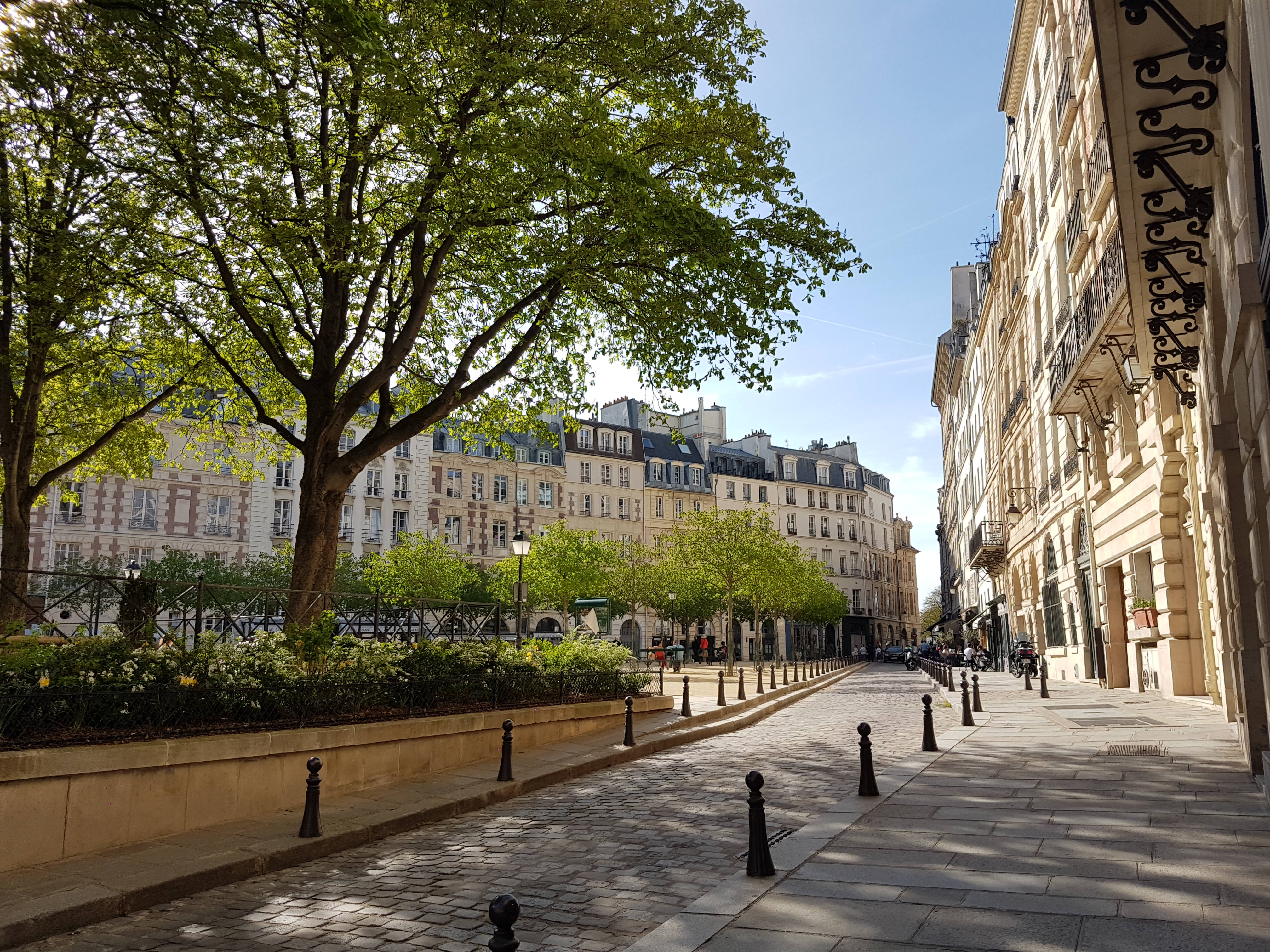 Place dauphine en mars 2017, coté pair, Paris